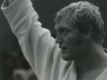 Wim Ruska